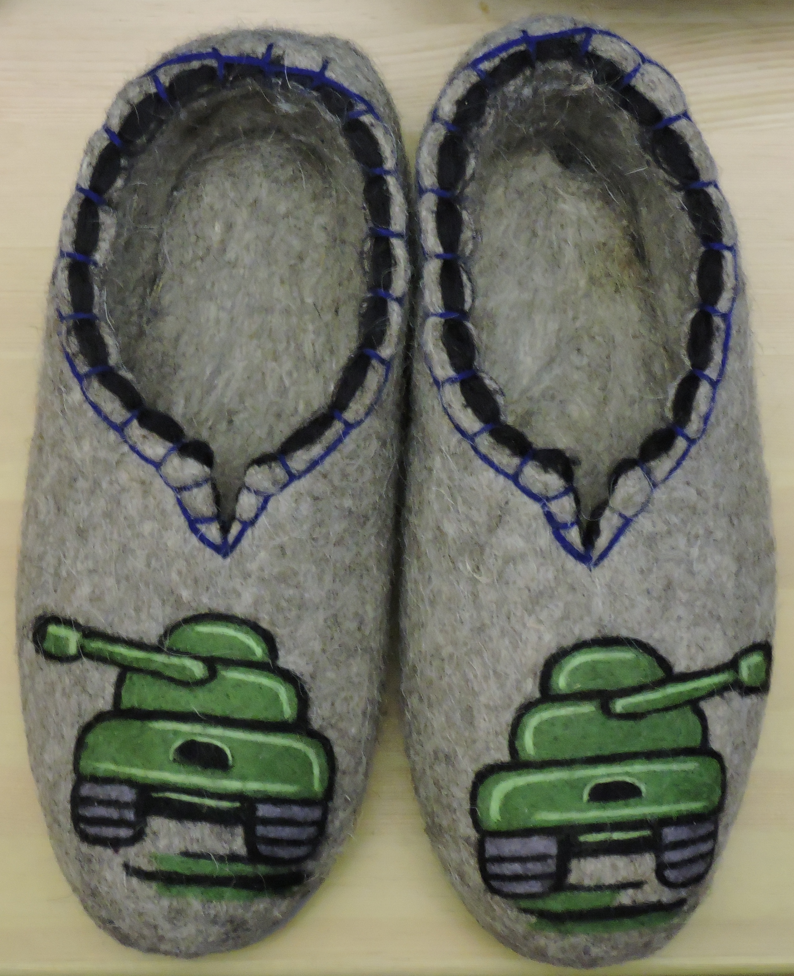 Тапки-валенки с танками